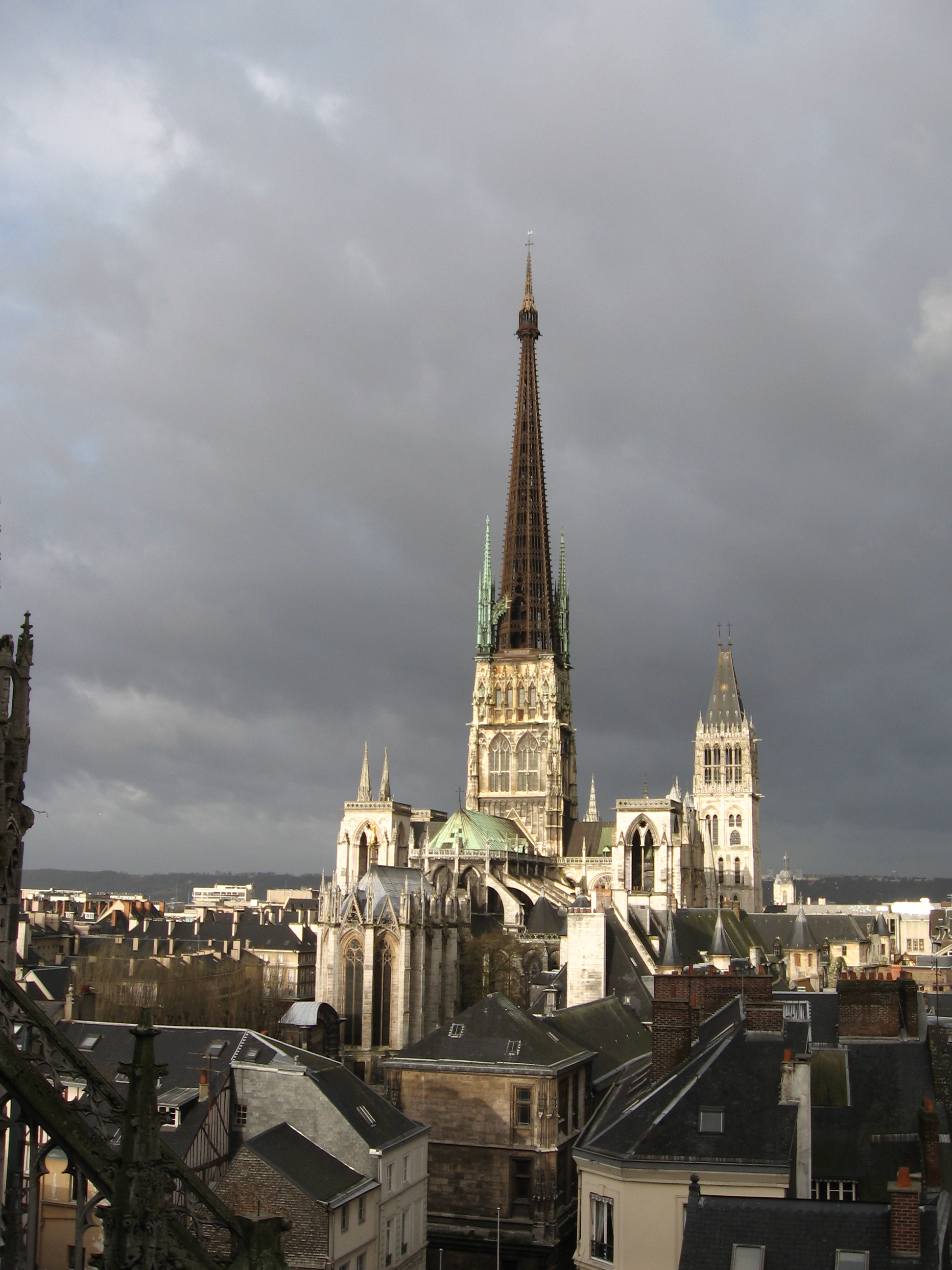 Cathédrale Notre-dame vu de l'église Saint Maclou .